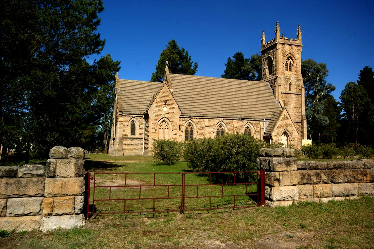 Opened November 1881